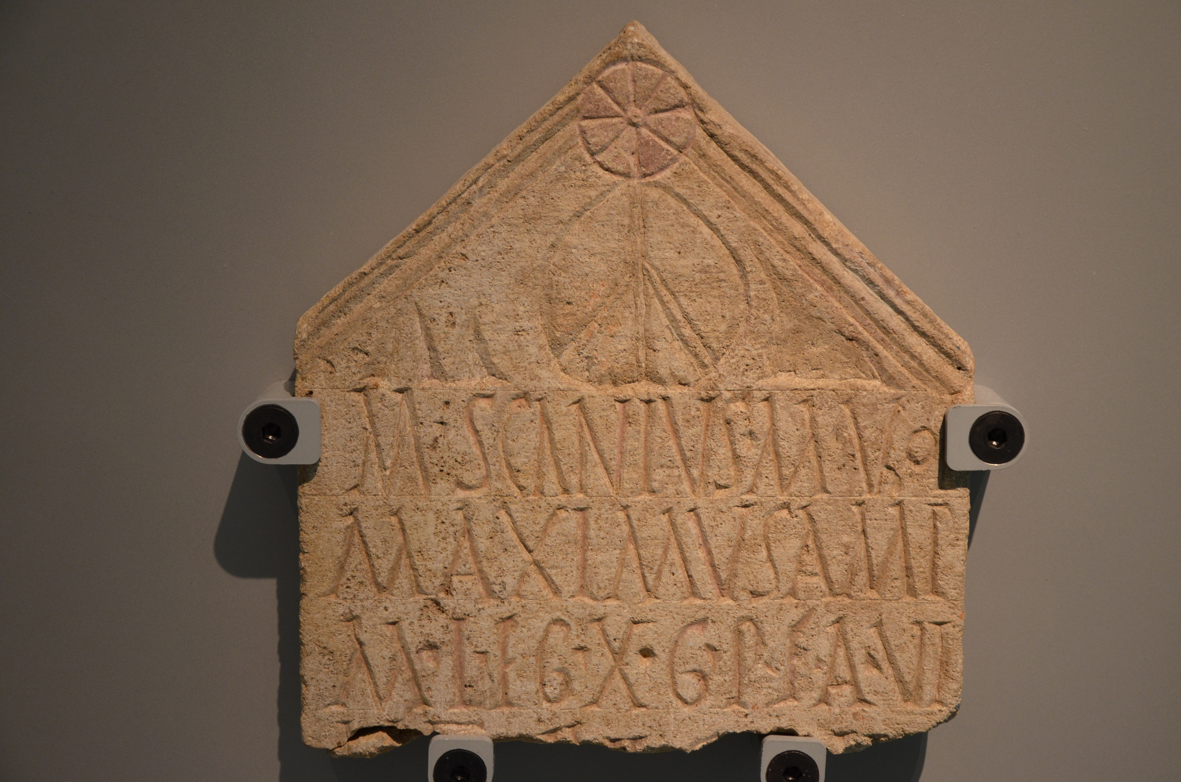 Museum het Valkhof, Nijmegen (Netherlands)